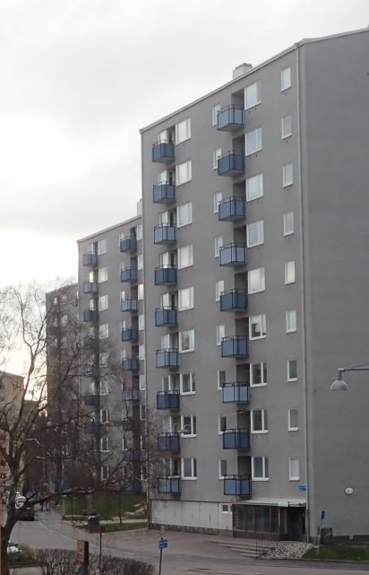 Syster Ainas gata, på Guldheden, i Göteborg.